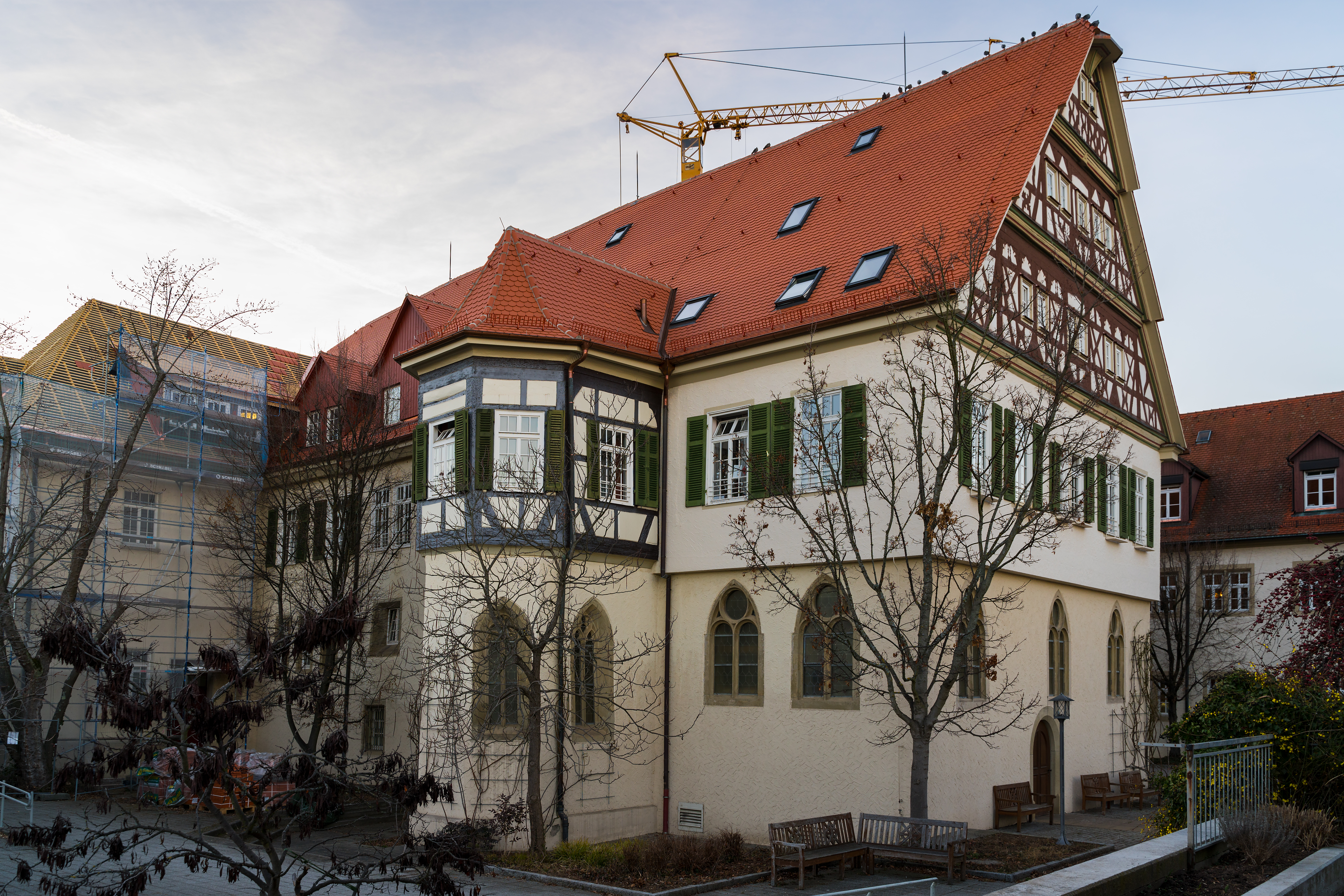 Schloss Stetten in Kernen im Remstal.